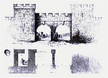 Rekonstruktionsversuch des Südtores von Kastell Banna (Birdoswald).